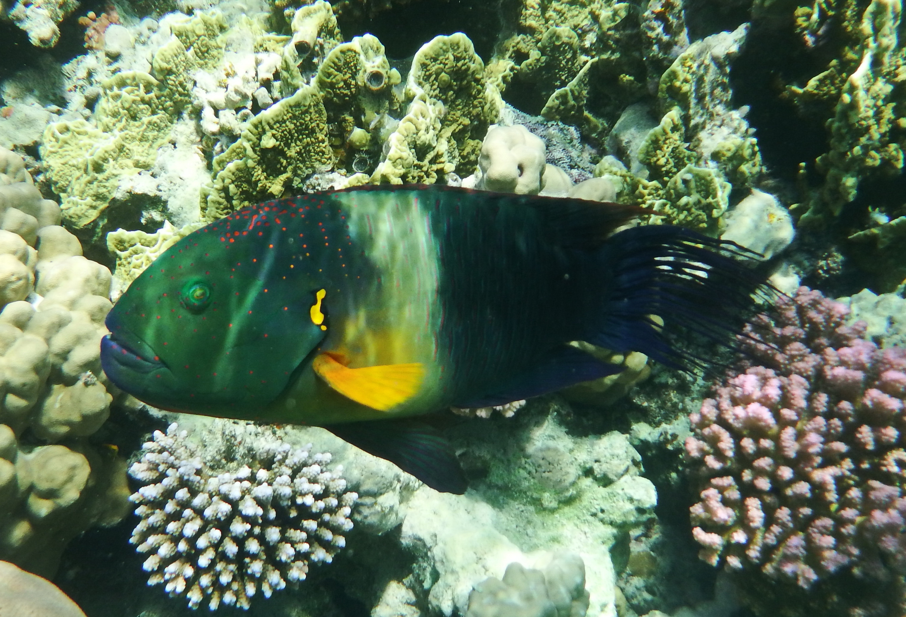 VIDEO